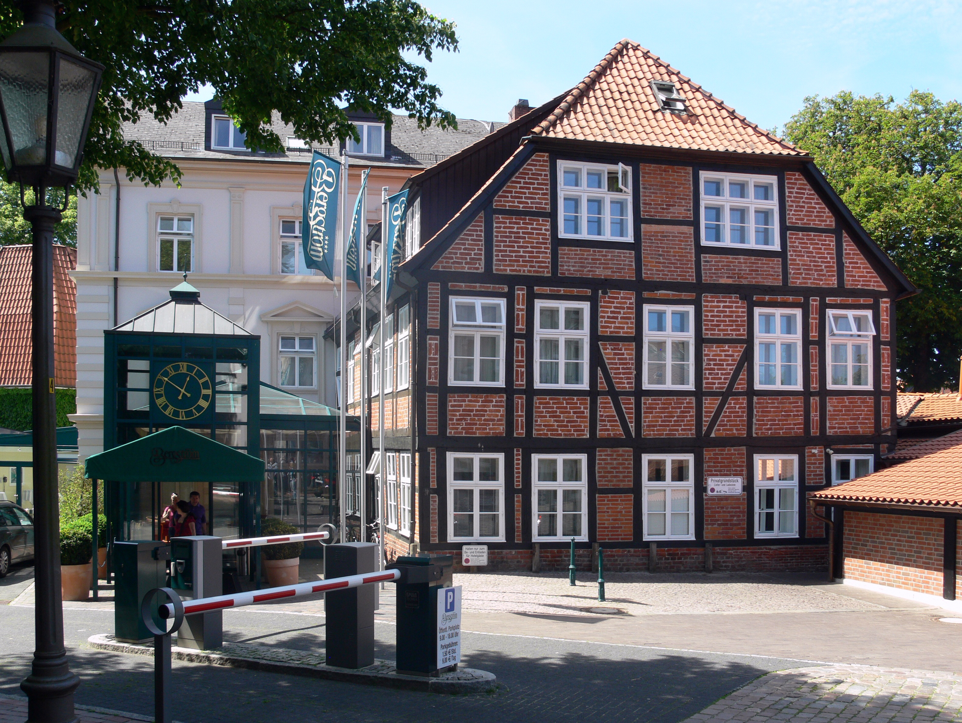 Lüneburg, Hotel Bergström, Haupteingang